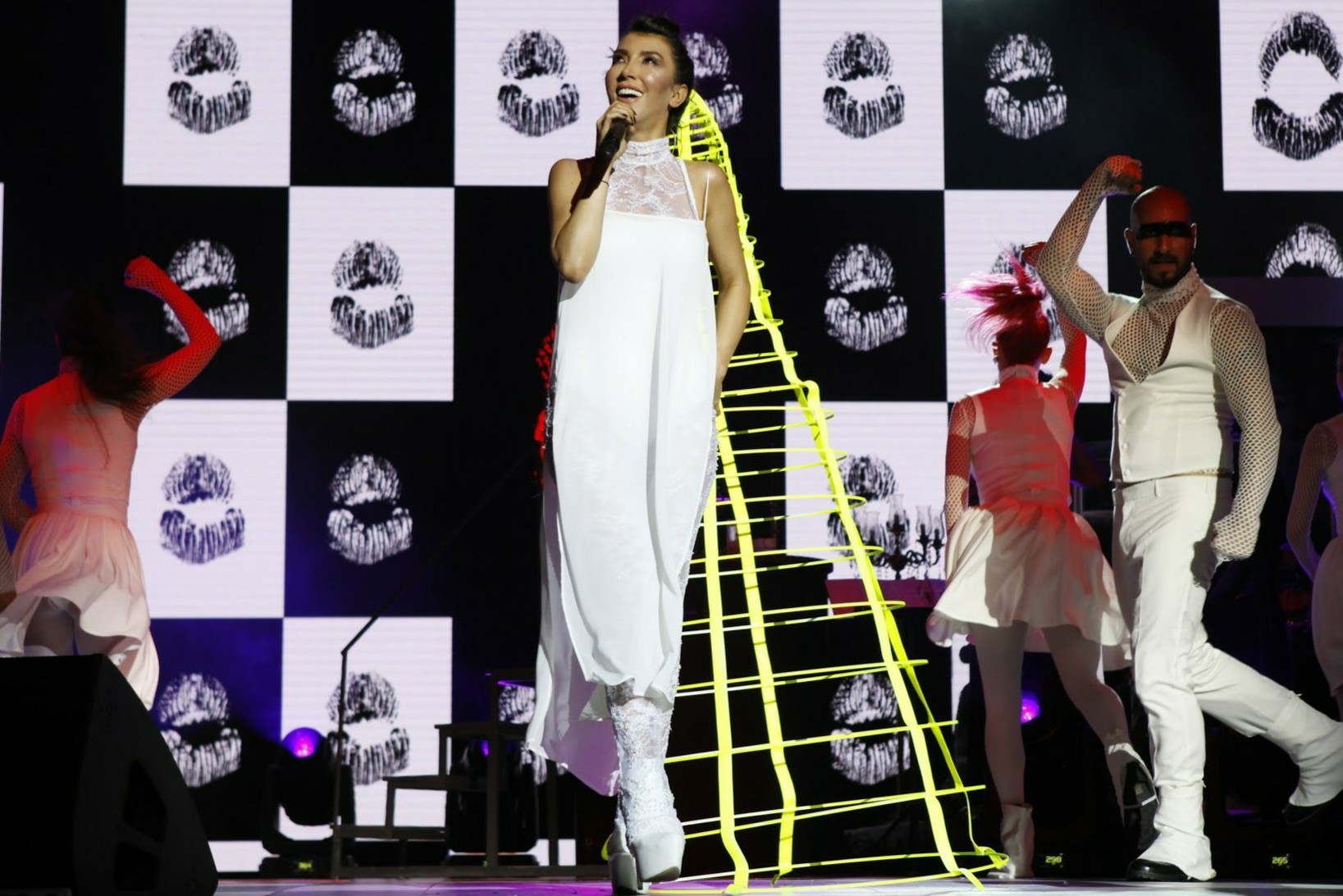 Hande Yener, 31 Temmuz 2015 tarihli Harbiye konserinde "Alt Dudak"ı söylerken.